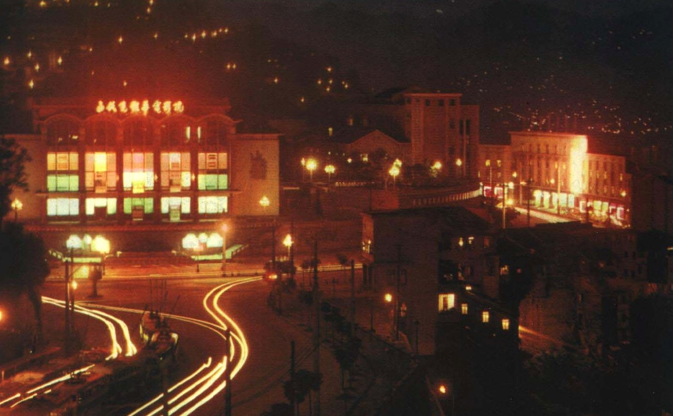 1963-09 1963年 重庆2